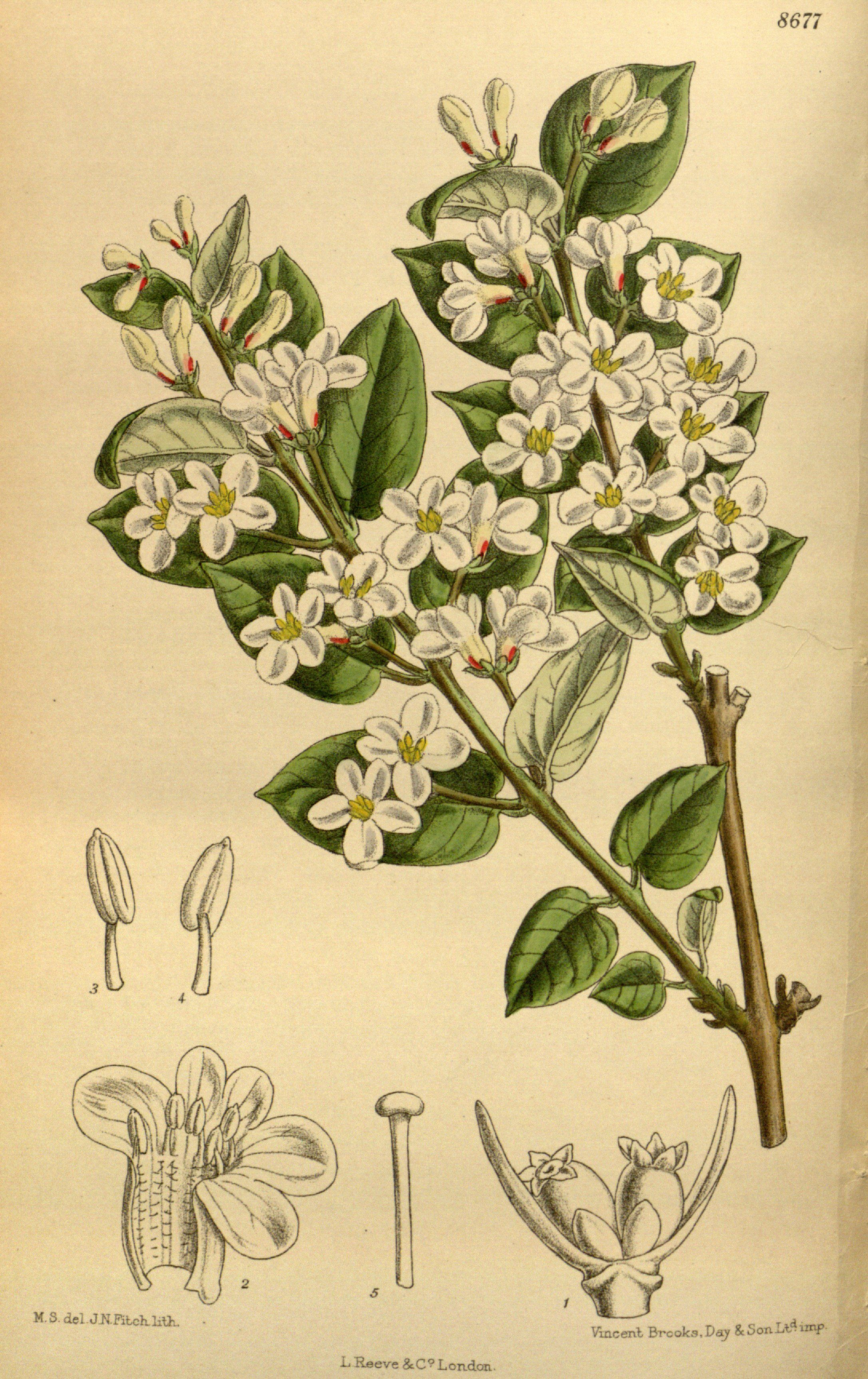 Lonicera tatarica, Caprifoliaceae